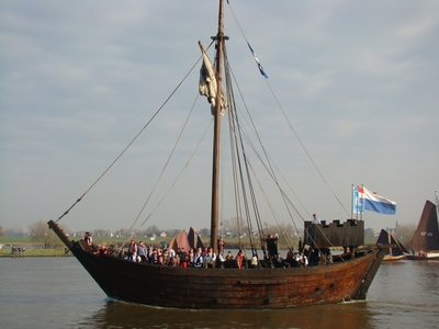 Nedersaksies: Kampen_kogge.jpg